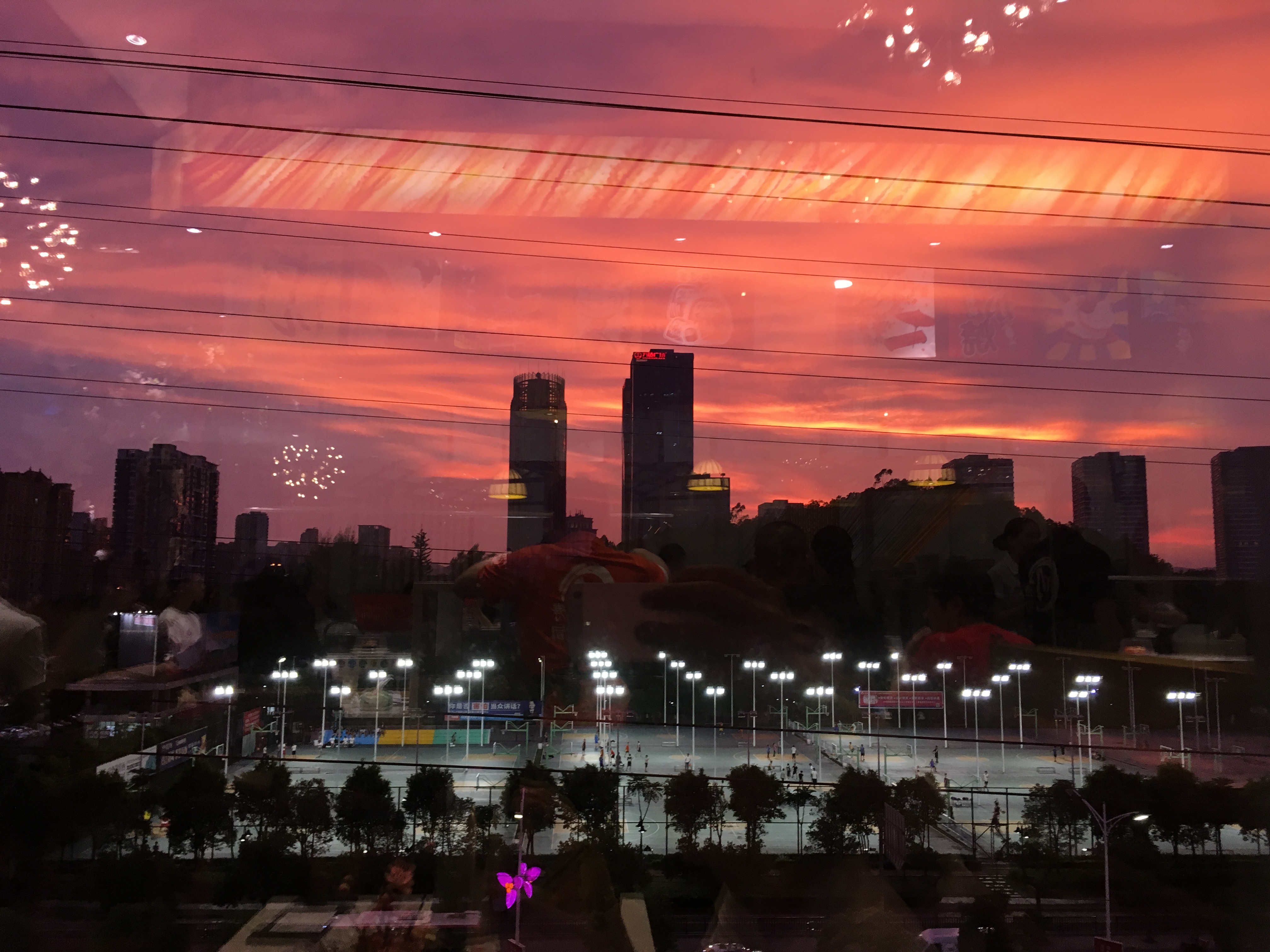 中文（中国大陆）: 近处为江门市蓬江区元宝山公园,远处为江门电视中心和万达广场